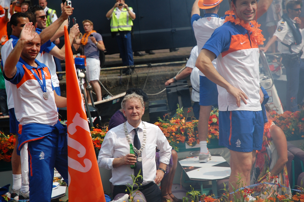 Demy de Zeeuw